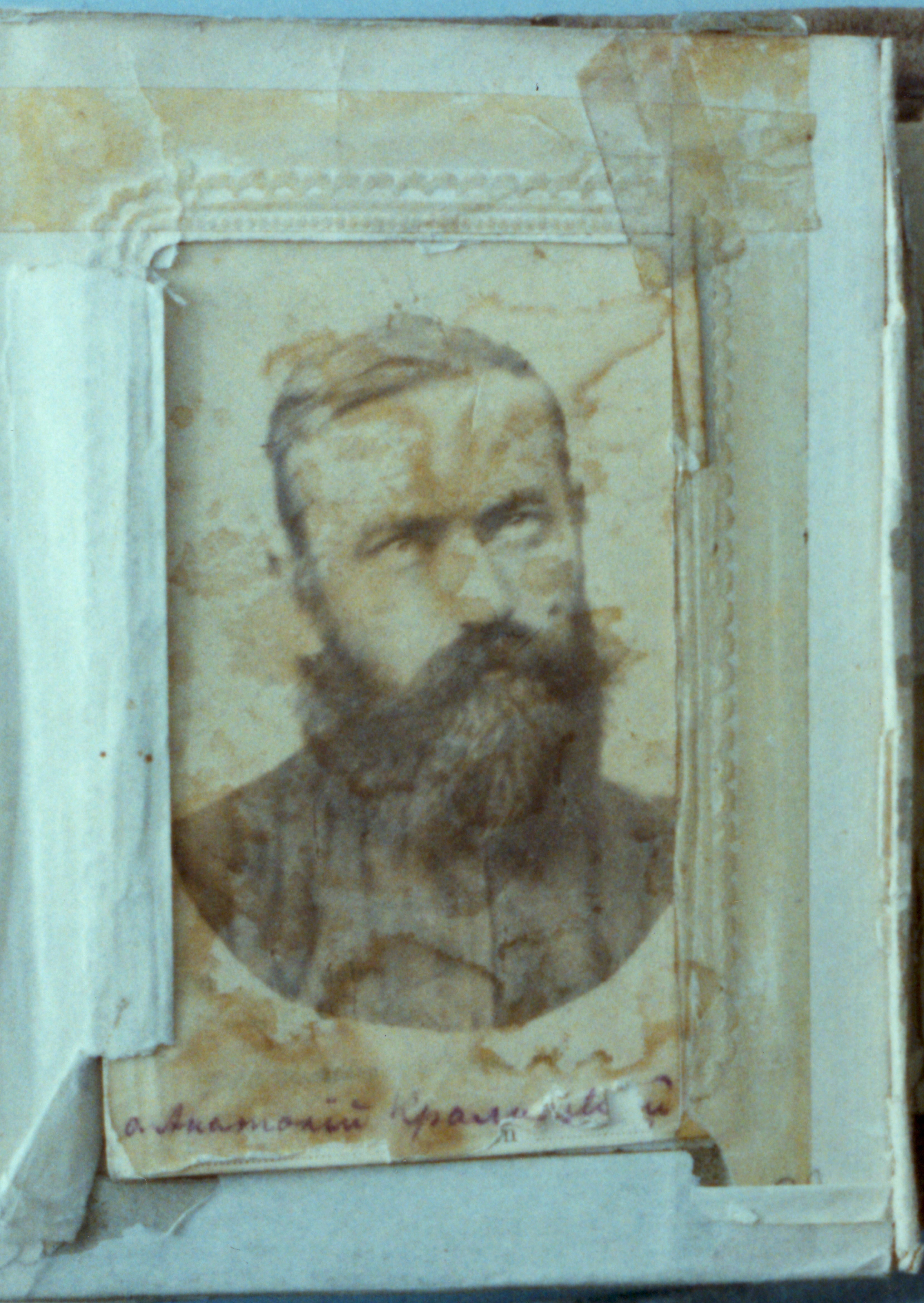 Анатолій Кралицький монах. Photo taken by Jozafát Vladimír Timkovič, OSBM